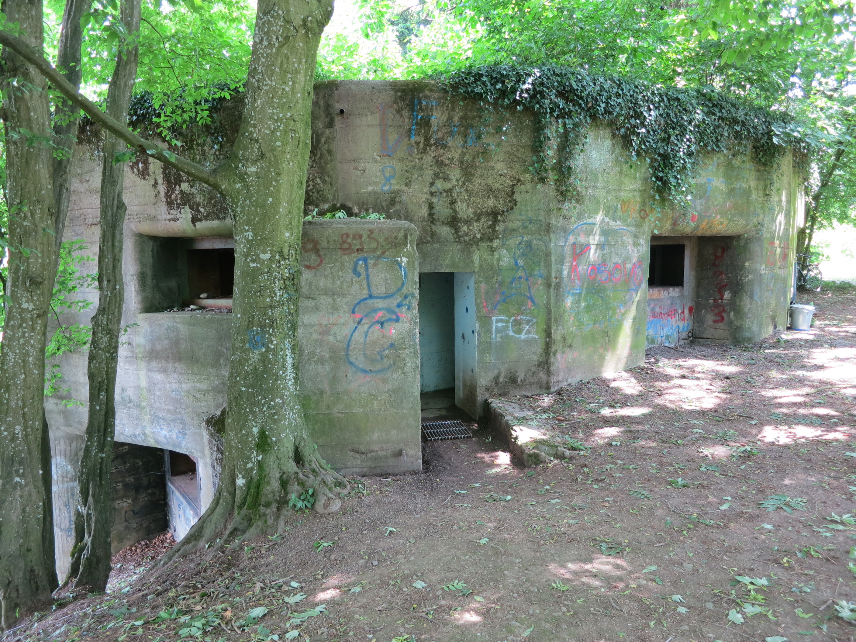 Bunker, Festung Dietikon ZH, Schweiz: A 5233